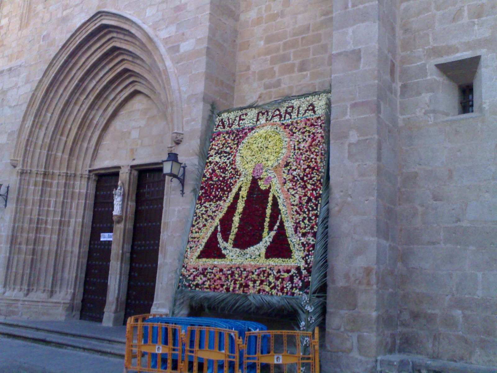 Flores en el exterior de la concatedral de Cáceres, España.